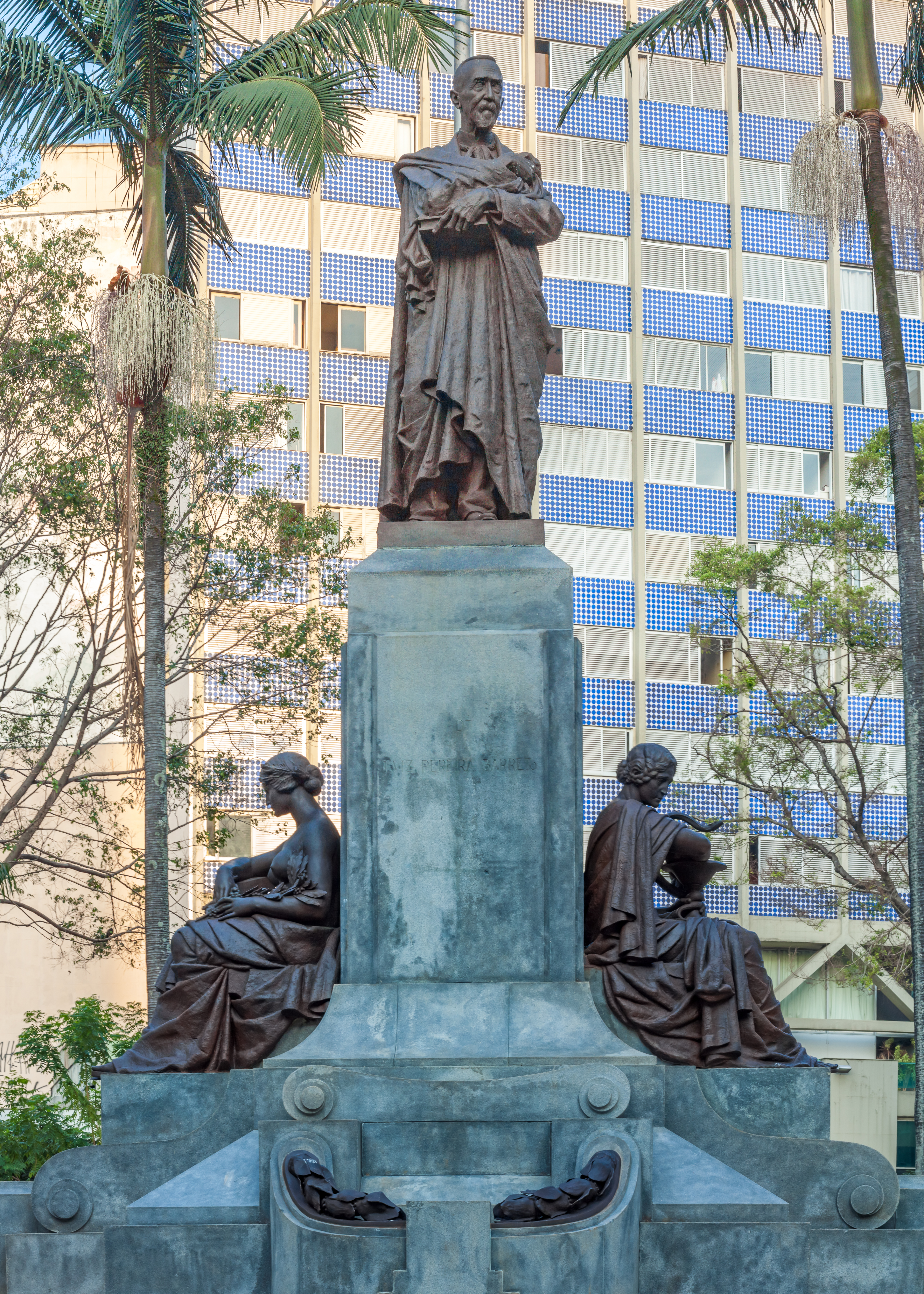 Estatua em homenagem ao Dr. Luís Pereira Barreto.